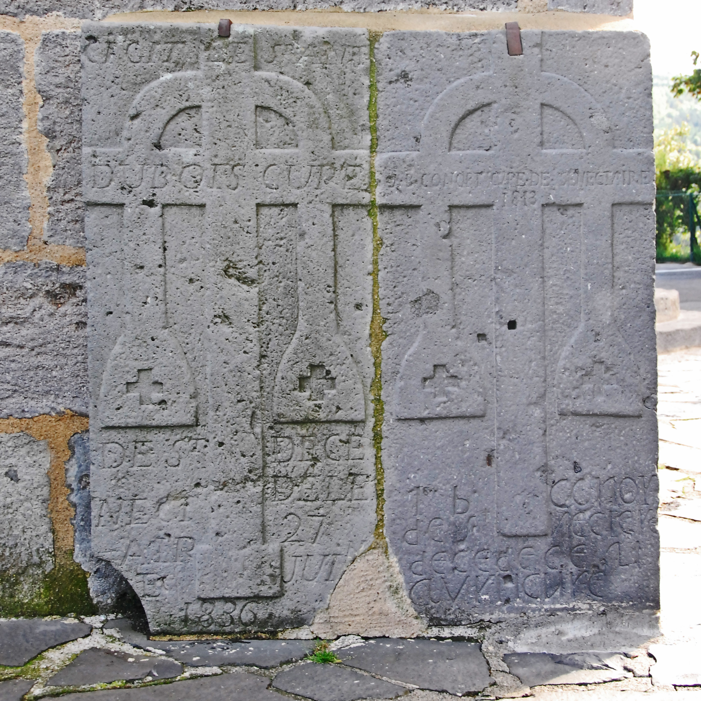 St-Nectaire, Grabsteine